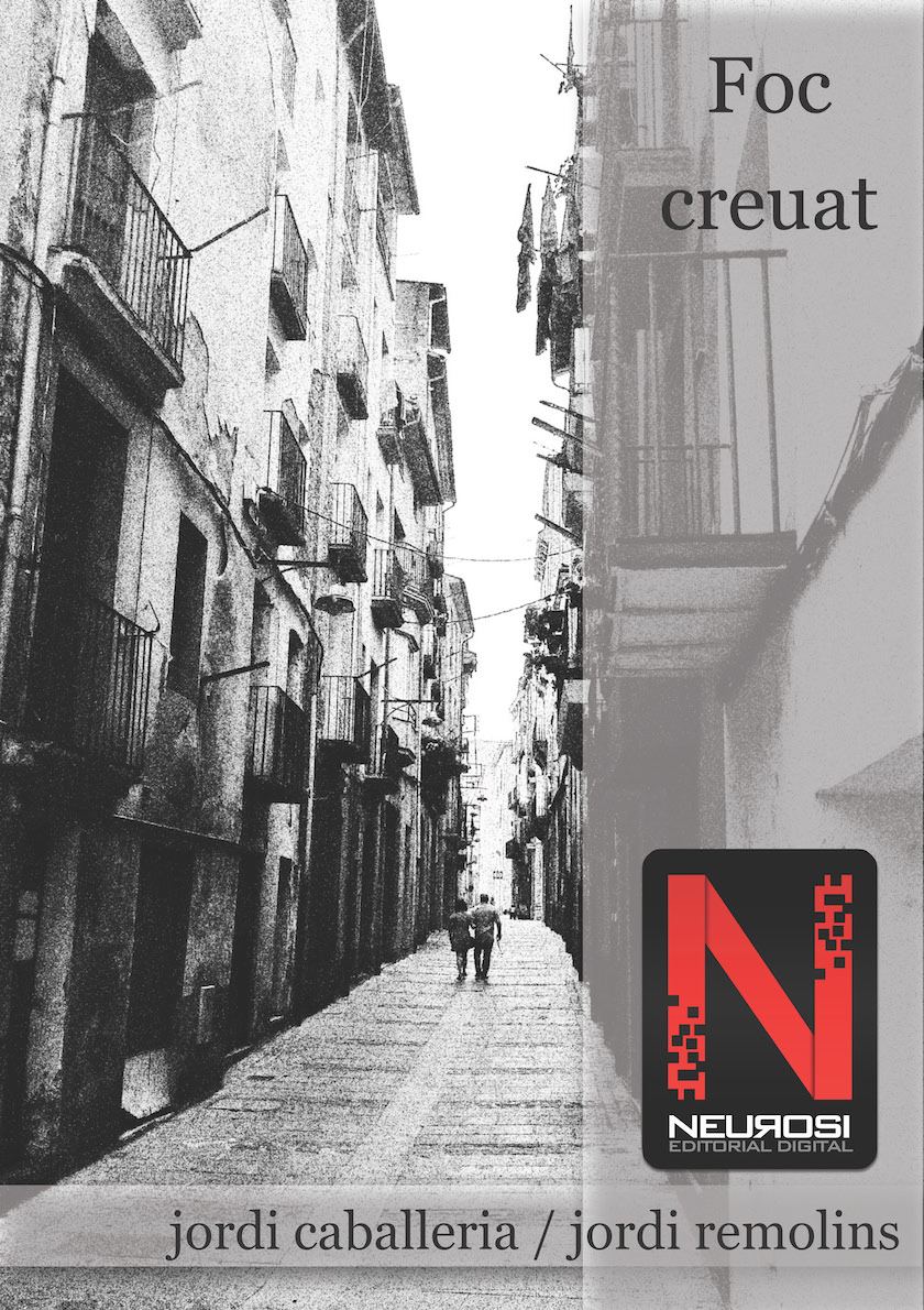 Portada de l'edició digital